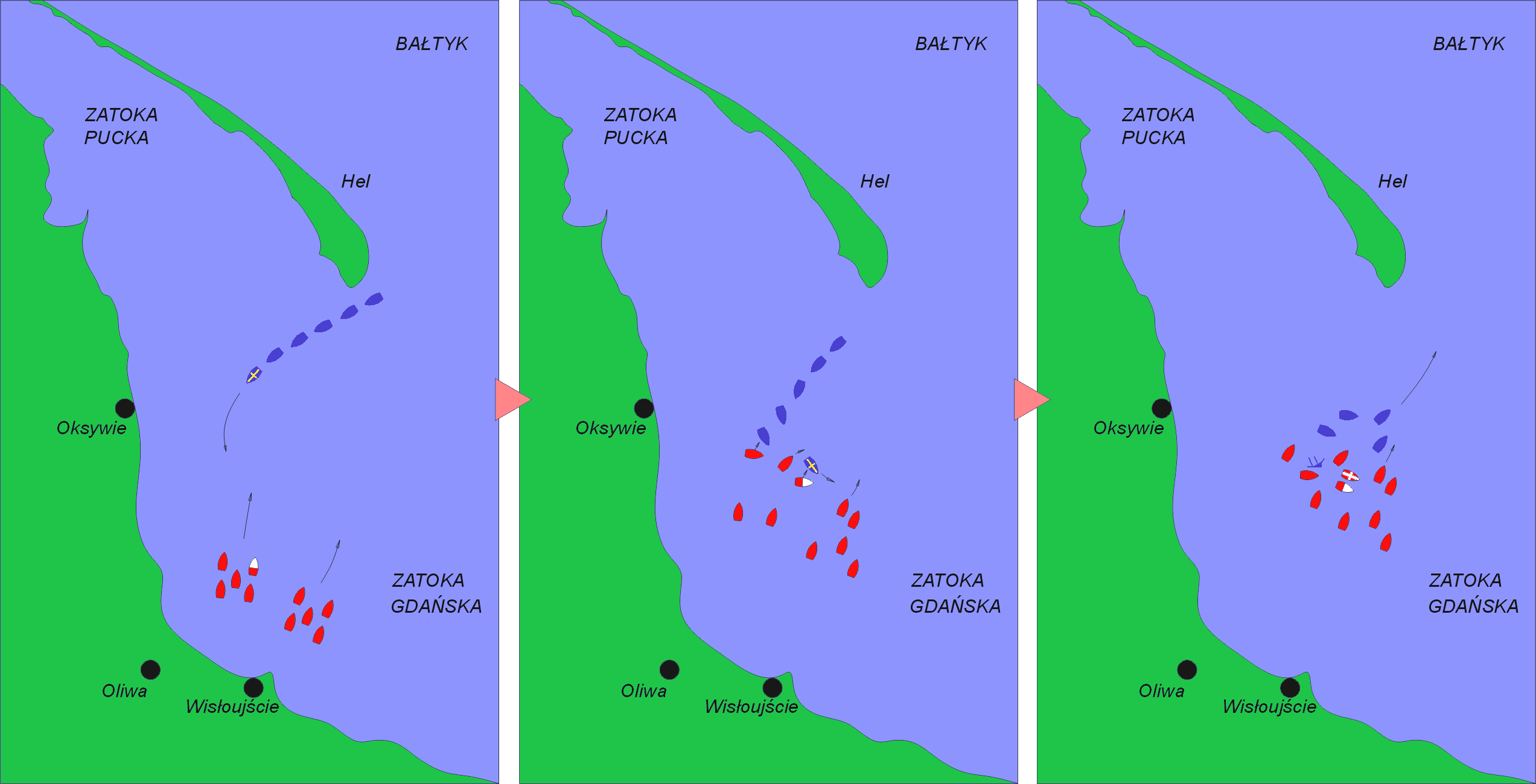 Schemat Przebiegu bitwy pod Oliwą